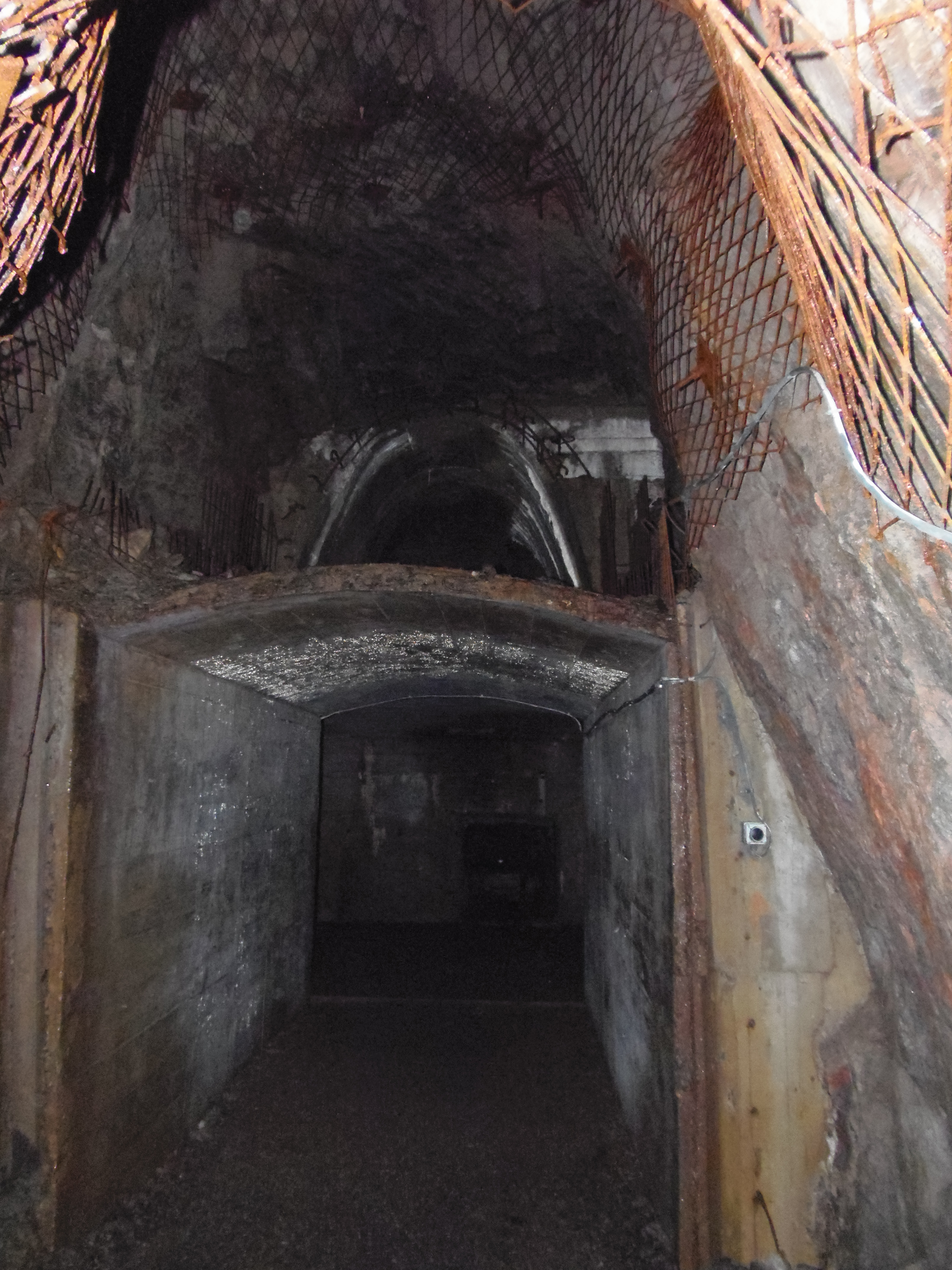 Tunel/korytarz w podziemnym mieście Hitlera